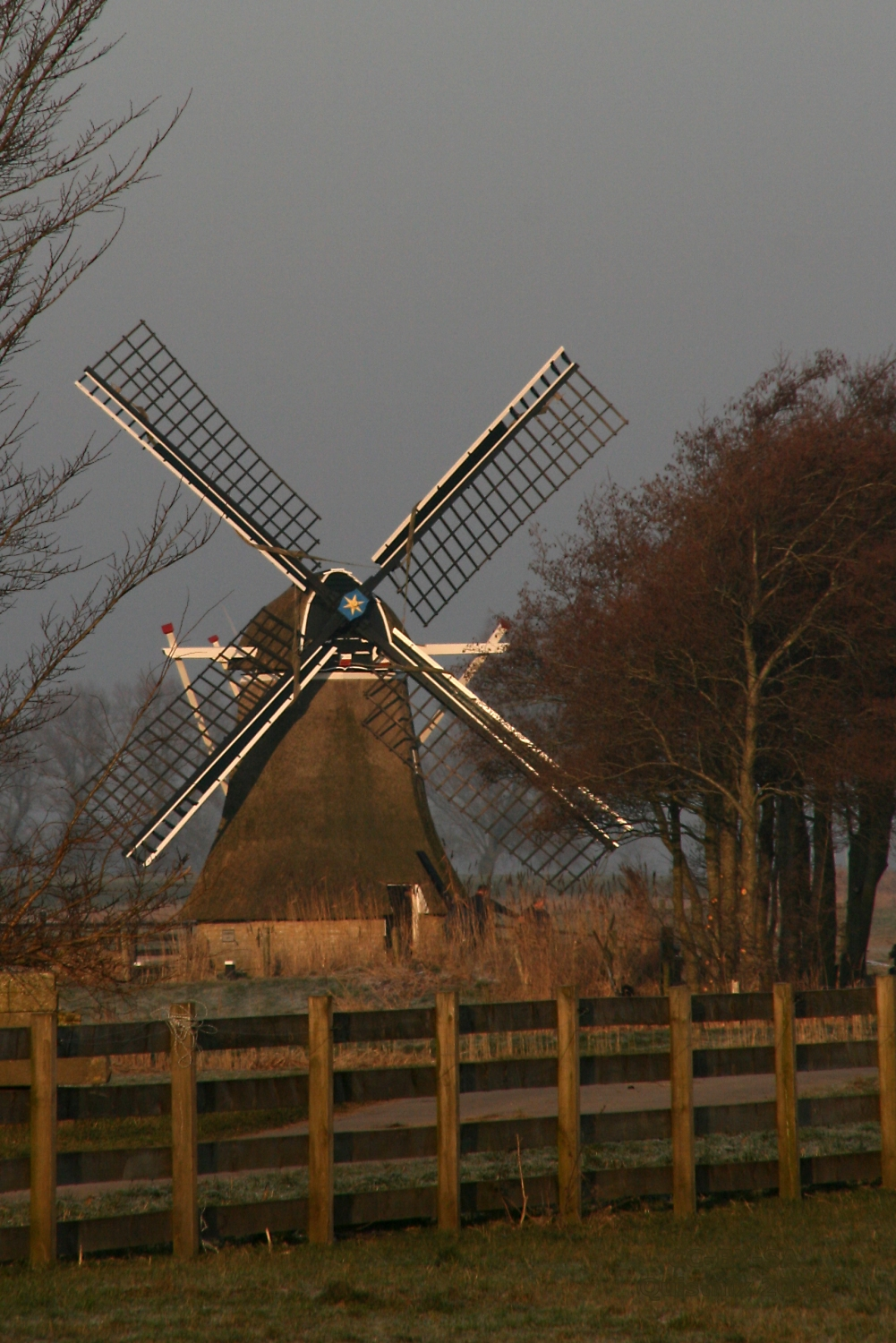 Dronrijp: Kingmatille zoals hij vanaf de openbare weg te zien is